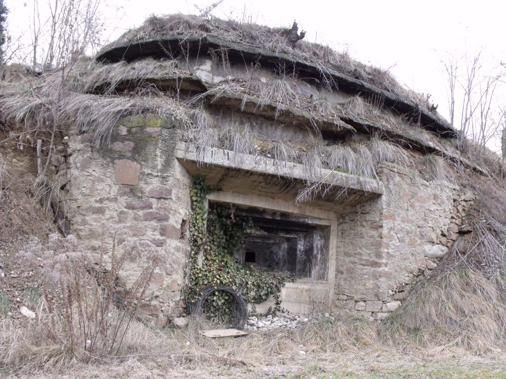 Opera 29 Bolzano